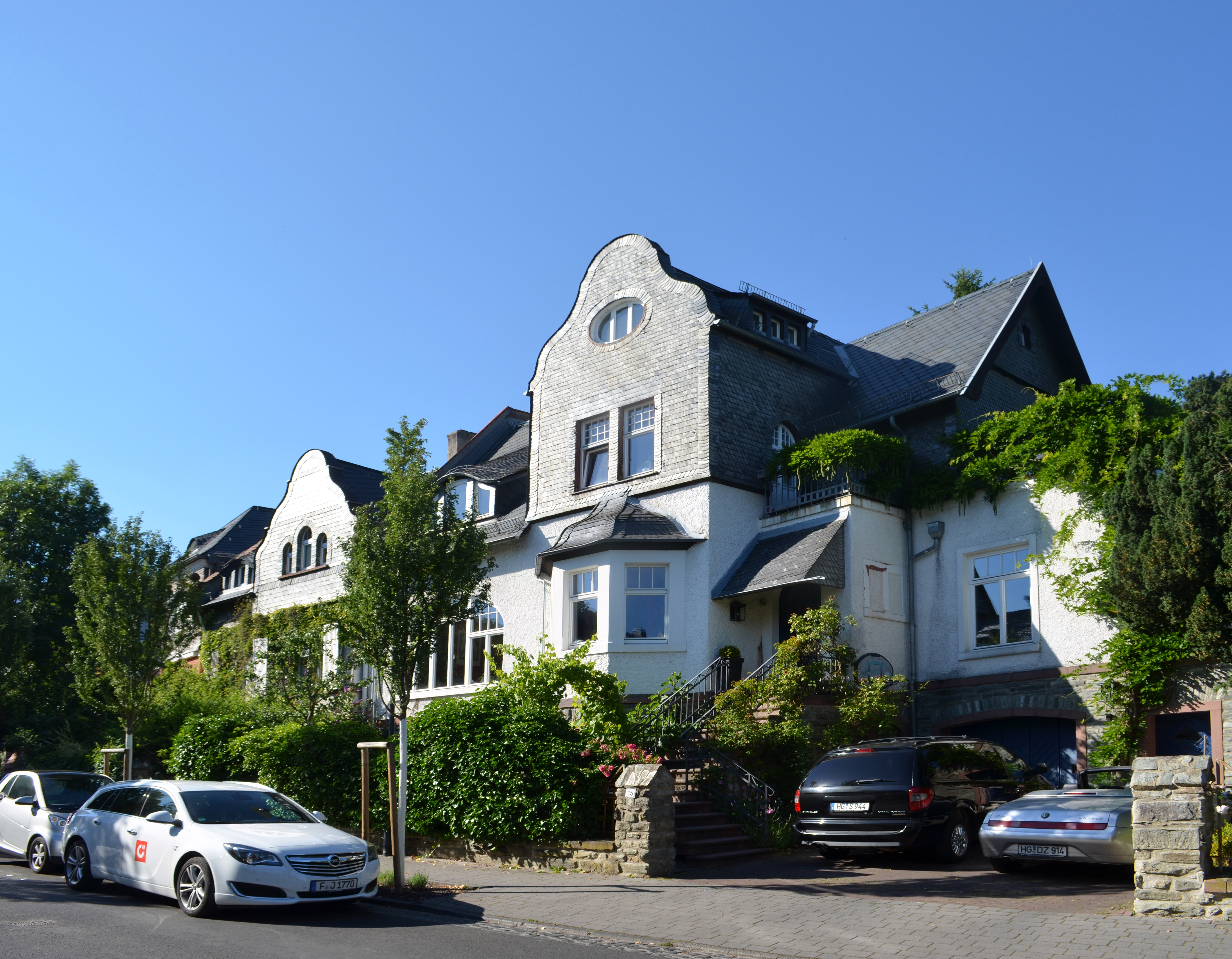 Kronberg, Burgerstraße 15